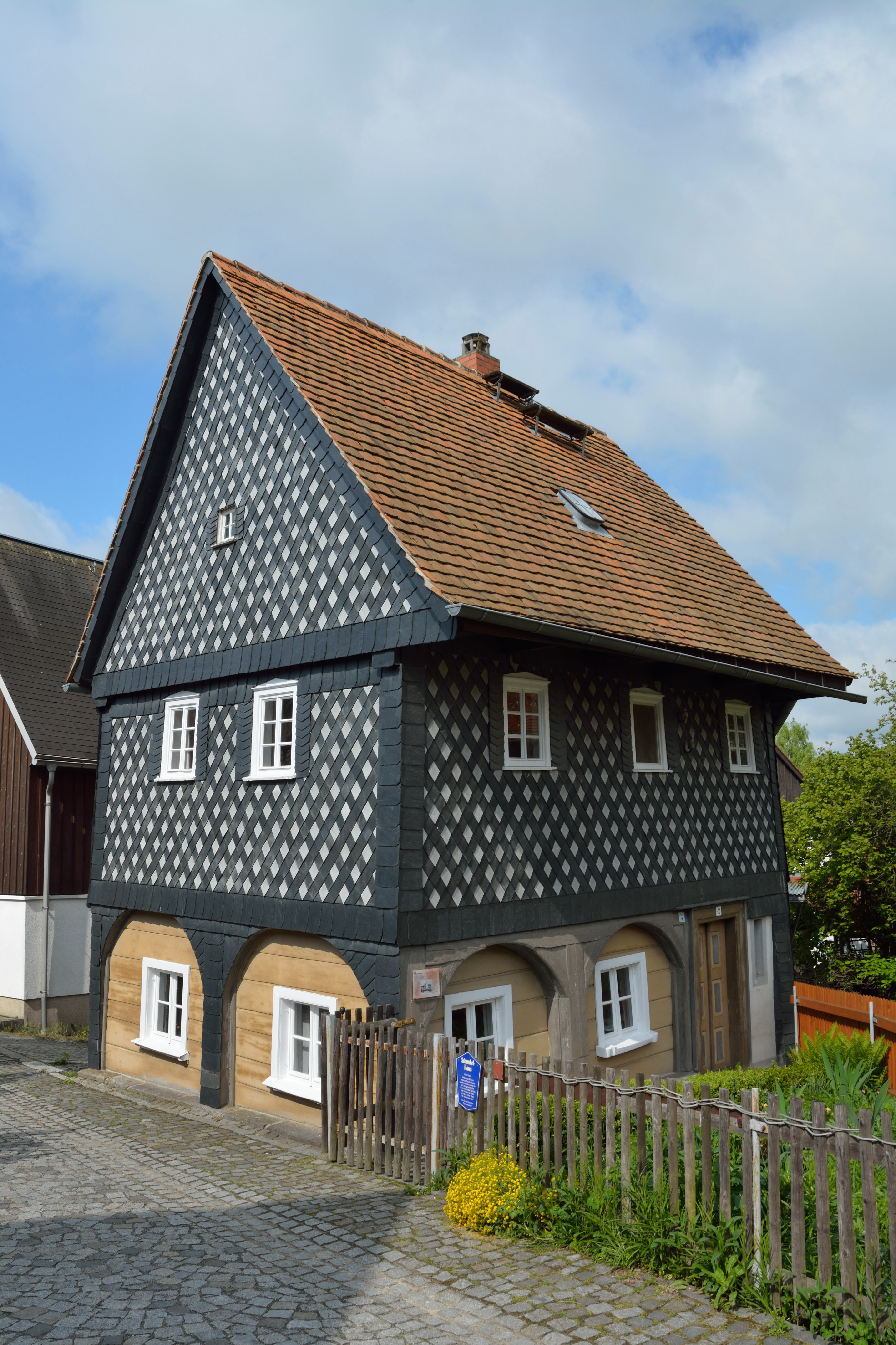 Ausflug nach Obercunnersdorf, das Schunkelhaus Land: Sachsen Landkreis:Görlitz Ort: Obercunnersdorf Strasse: Klippelgasse Hausnummer: 2